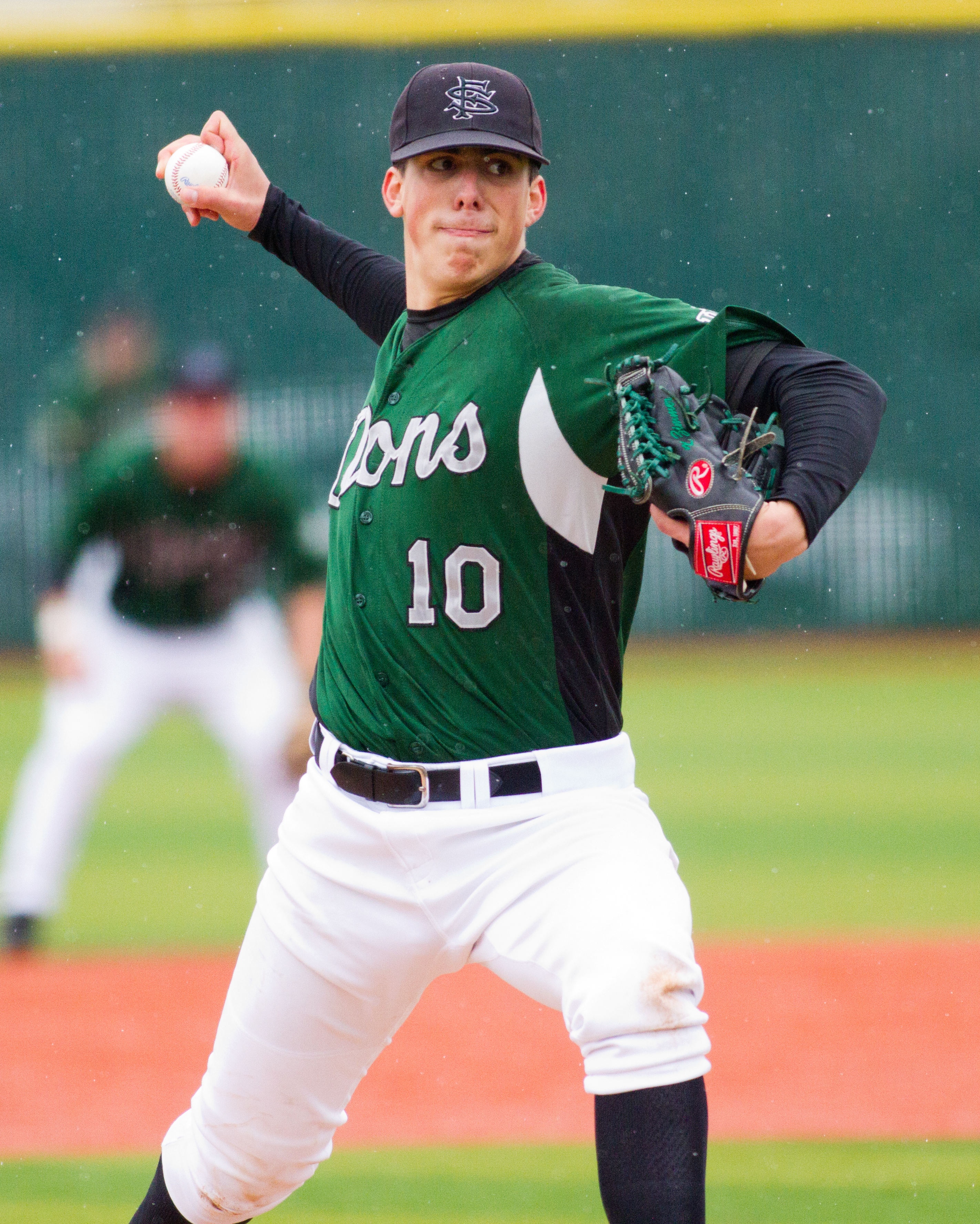 Kyle Zimmer (10)